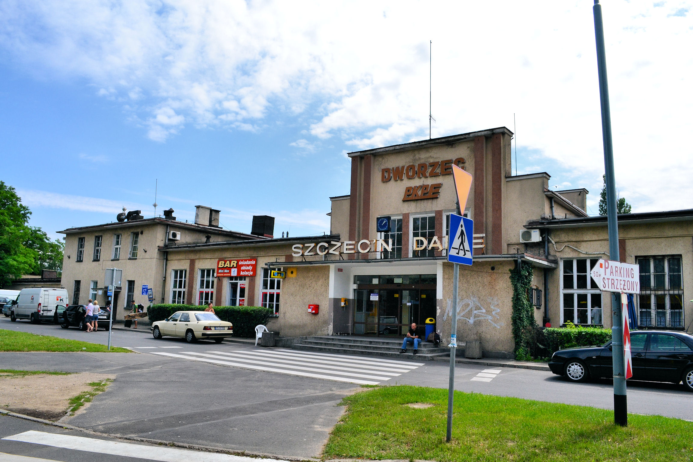 Stacja kolejowa Szczecin Dąbie